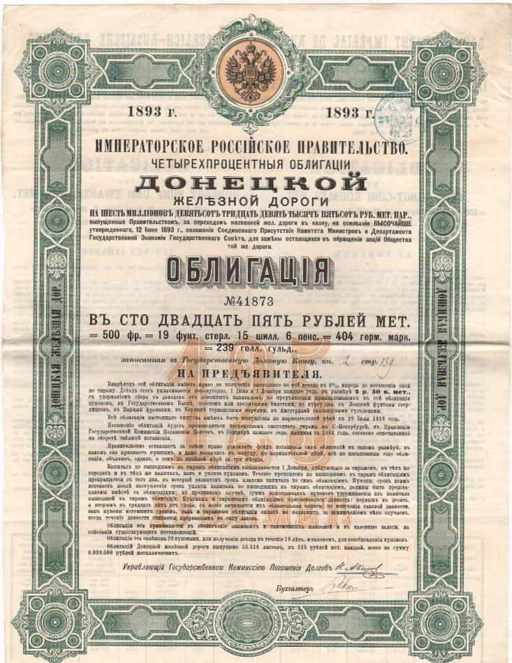 Донецкая железная дорога. Облигация в 125 рублей металлом